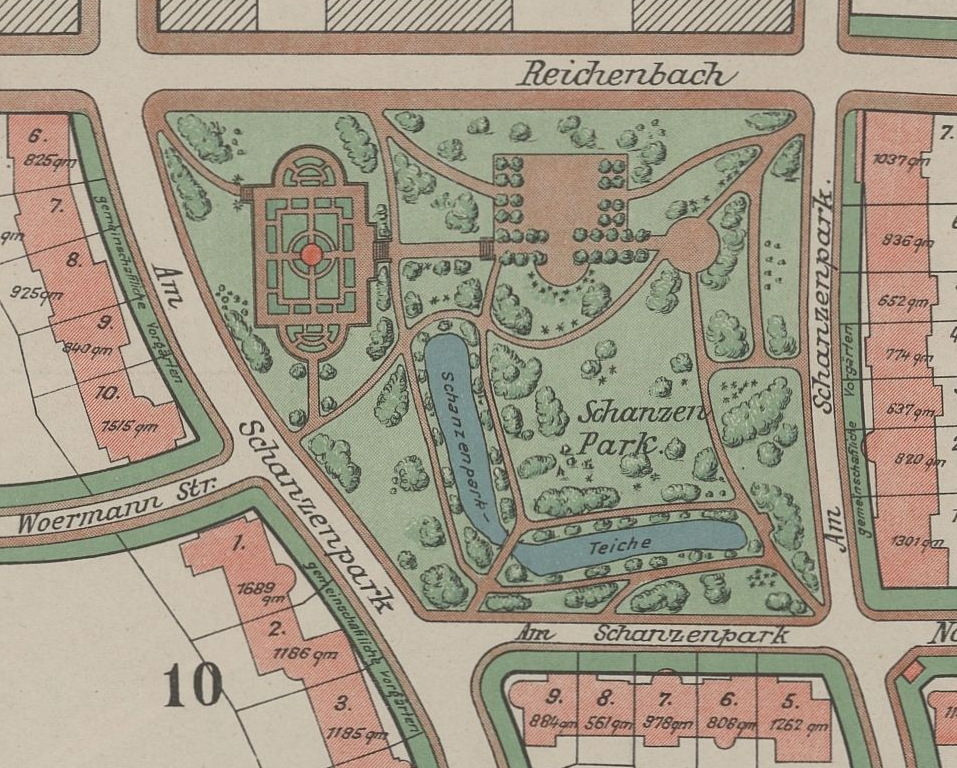 Ausschcnitt des Schanzenparks (seit 1926 Beutlerpark) aus dem Parzellierungsplan vom Gelände der Terraingesellschaft Dresden-Süd